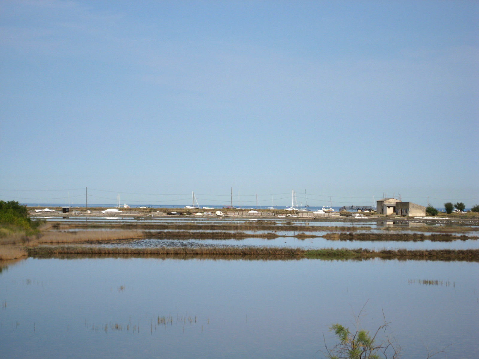 Strunjanske soline